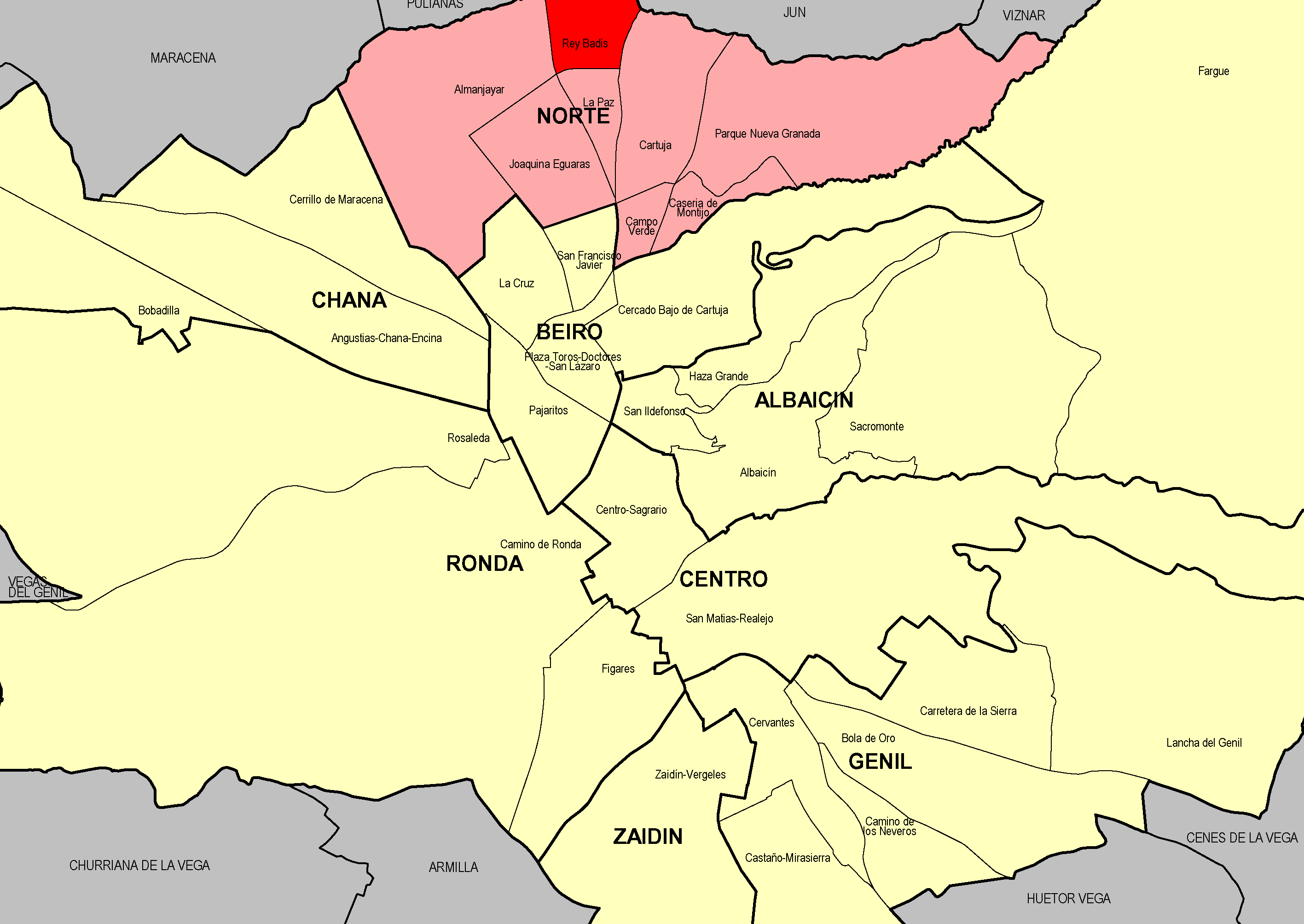 Barrio Rey Badis, en el distrito Norte (ciudad de Granada, España)